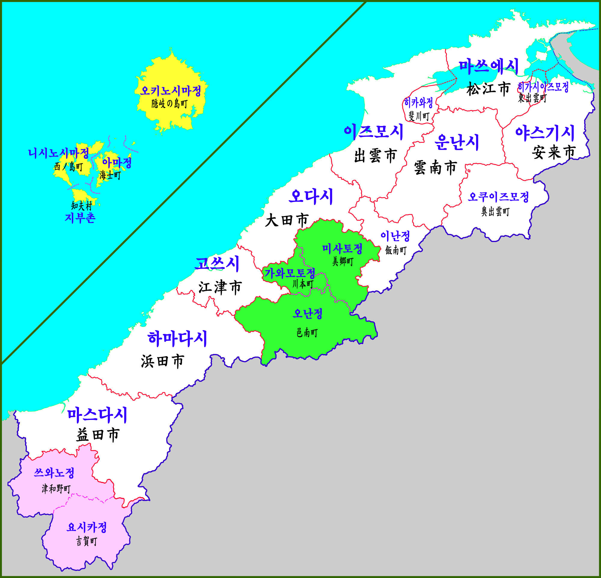 시마네현 행정구역